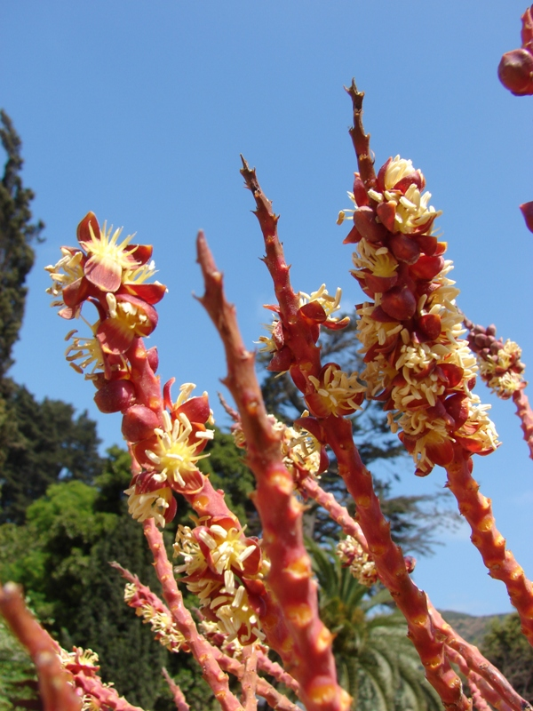 Flores masculinas en los extremos de las ramas florales